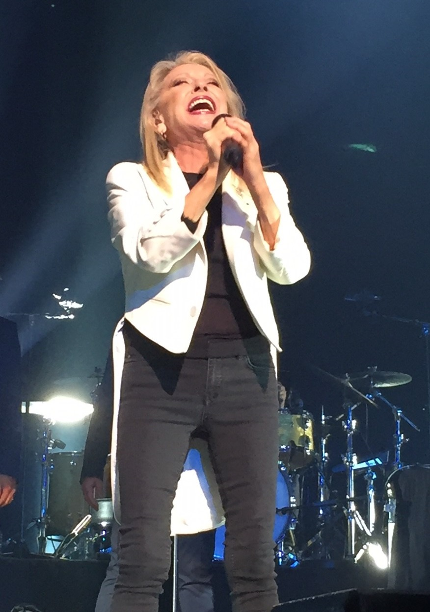 Véronique Sanson en concert à la Seine musicale de Boulogne-Billancourt le 13 avril 2018.